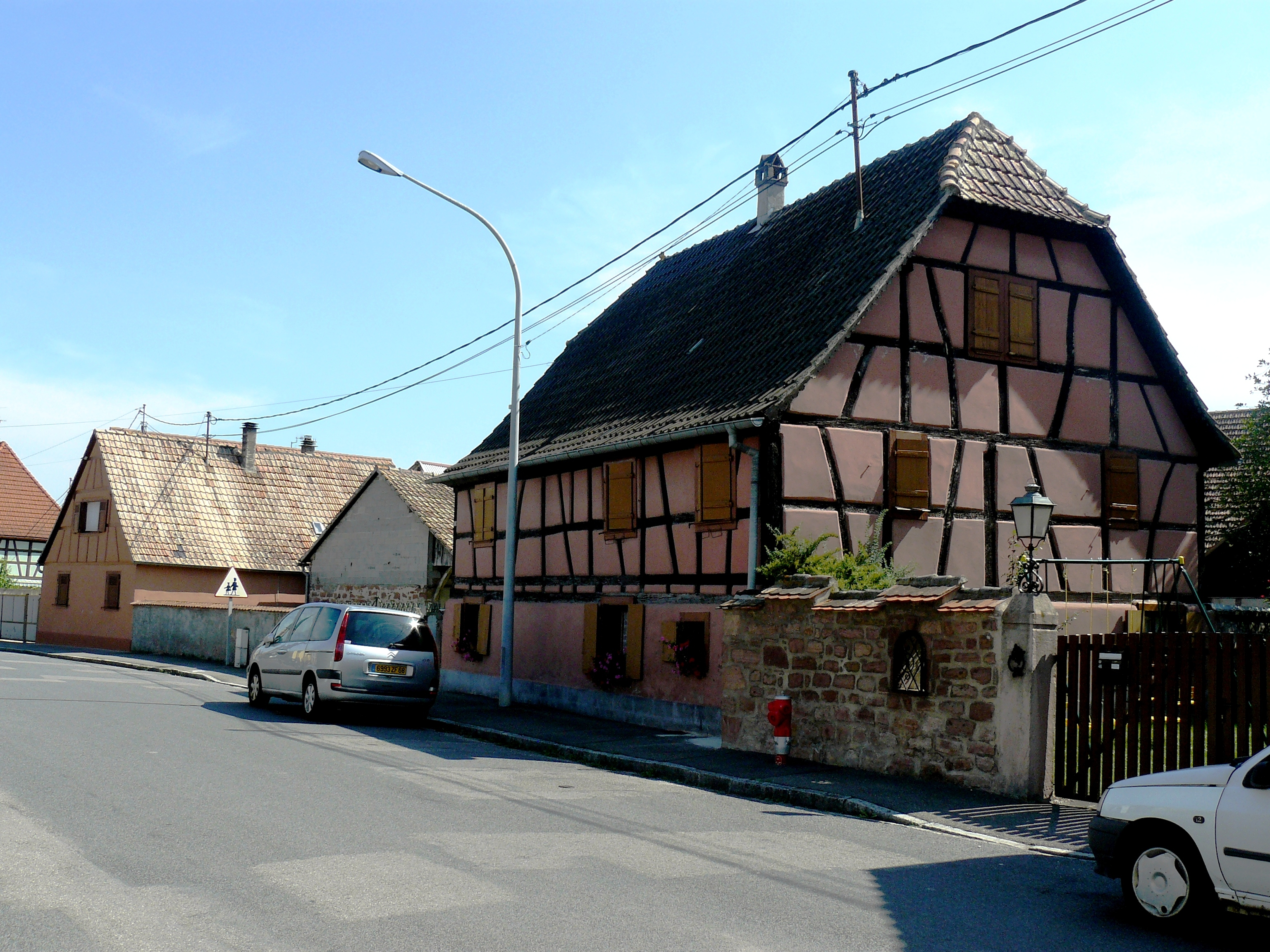 Maison à colombage